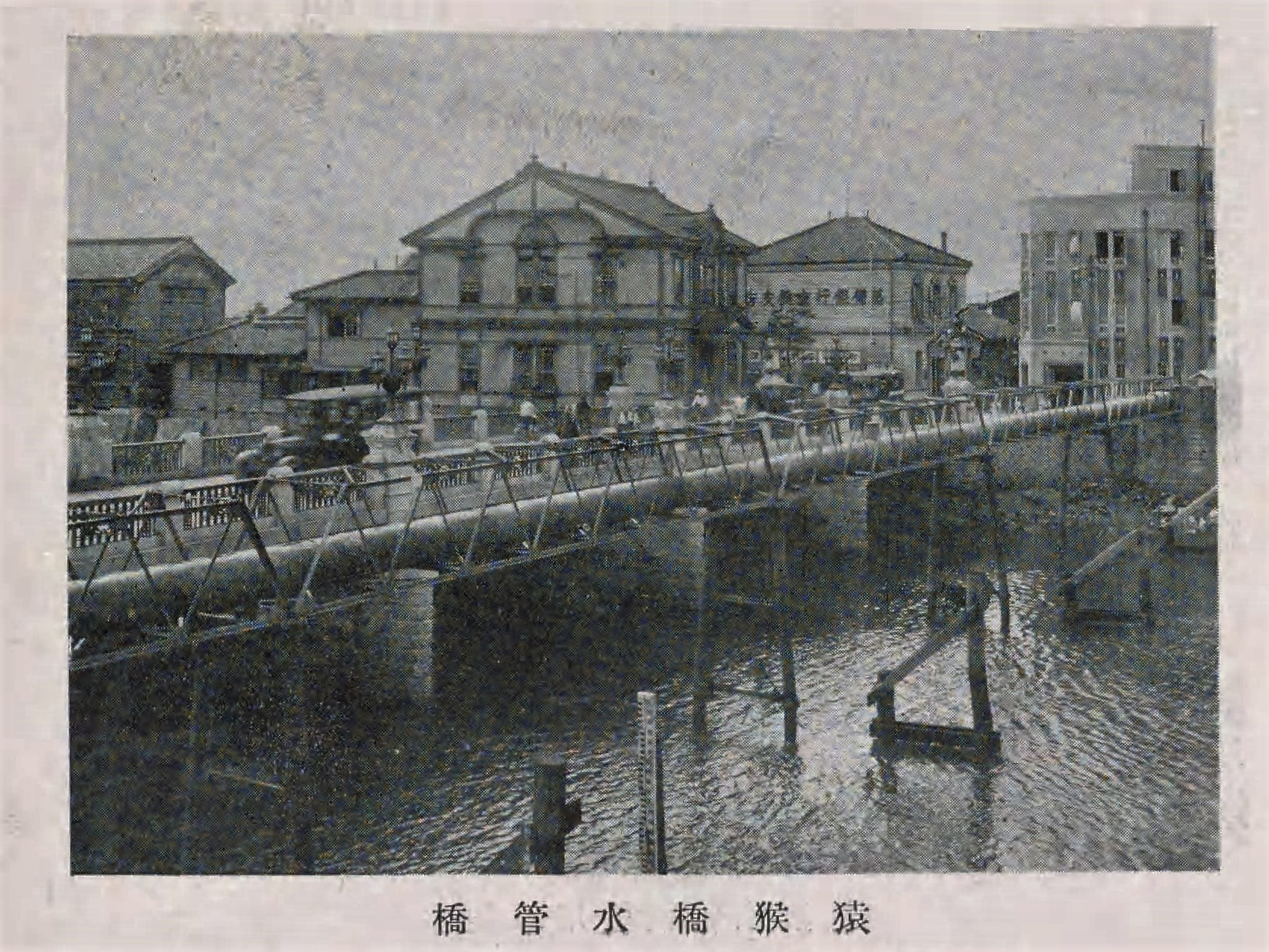 1930年代の広島市の猿猴橋水管橋